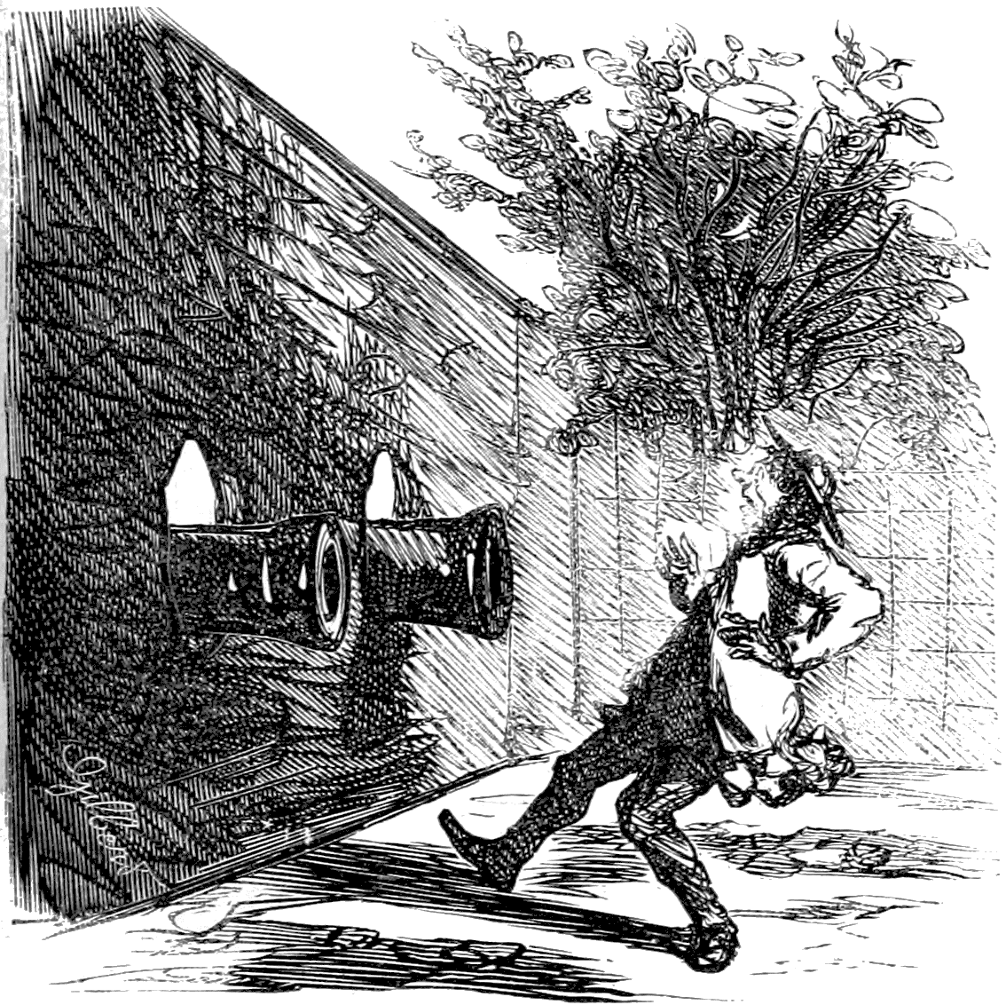 Art. 662. — L’un des voisins ne peut pratiquer dans le corps du mur mitoyen aucun enfoncement. Merci ! il ne manquerait plus qu’il puisse y placer de l’artillerie pour vous tenir en respect.